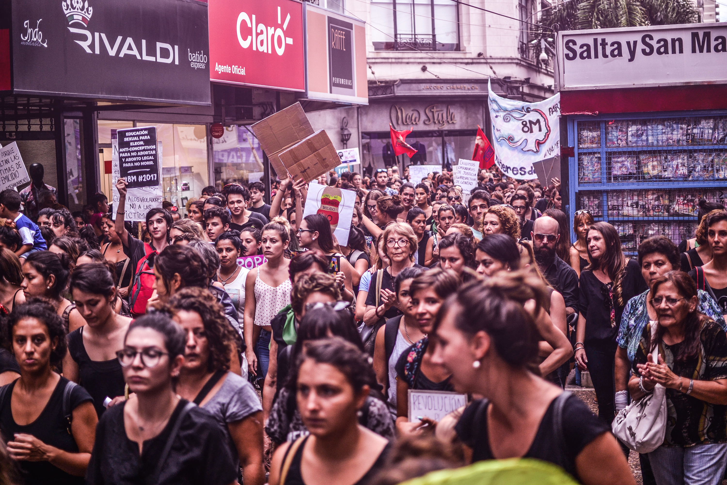 Paro Internacional de Mujeres en Santa Fe 2017 - Nosotras Paramos - 8M